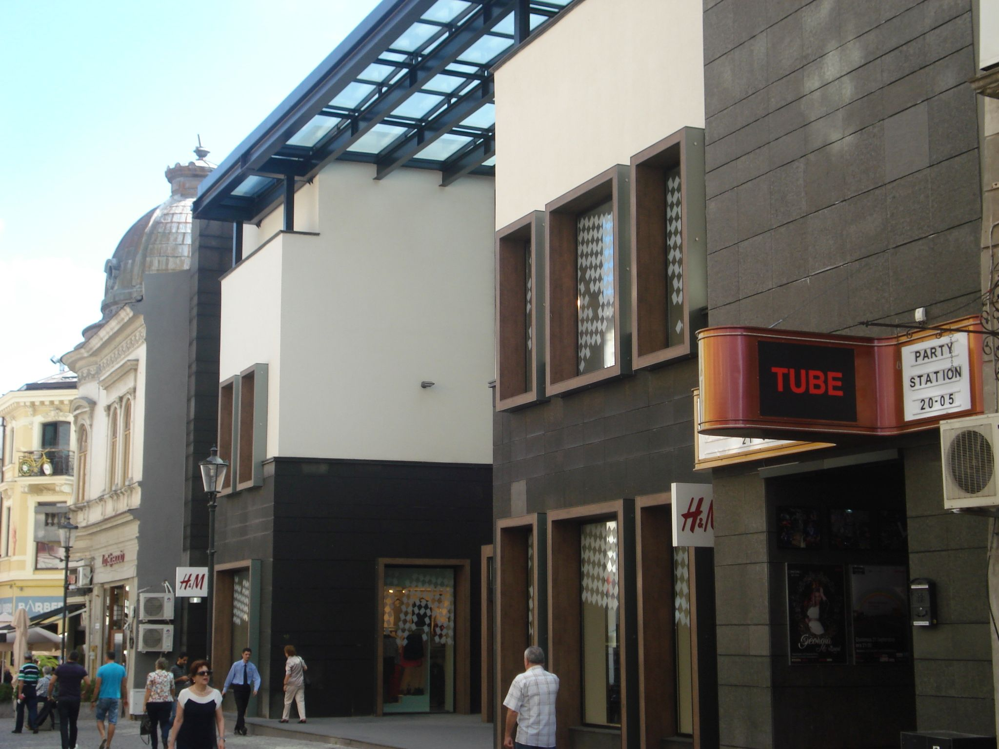 Str. Lipscani nr. 30-34 (imobil-nou)